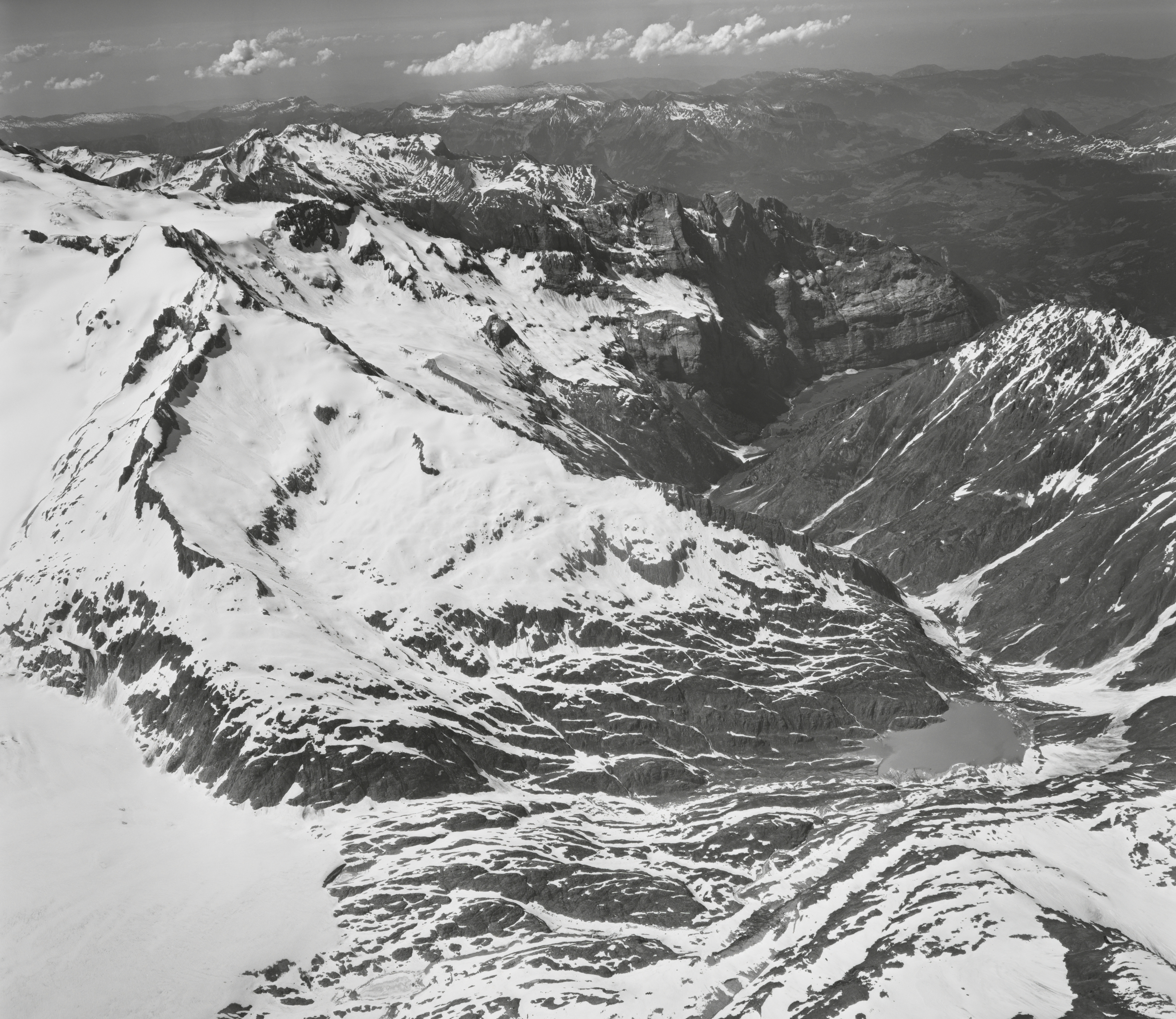 Blick Richtung Norden: Urbachtal mit Engelhörner (links), vorne links der Gauligletscher, Bildmitte der Mattenalpsee